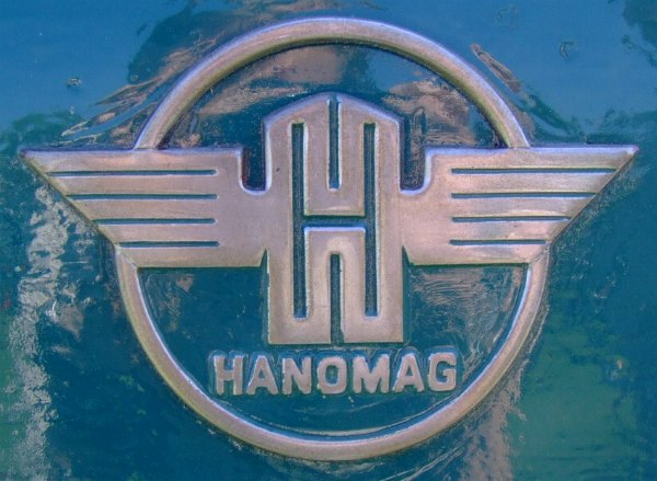 Logo eines Hanomag-Schleppers R35B (Baujahr 1956)